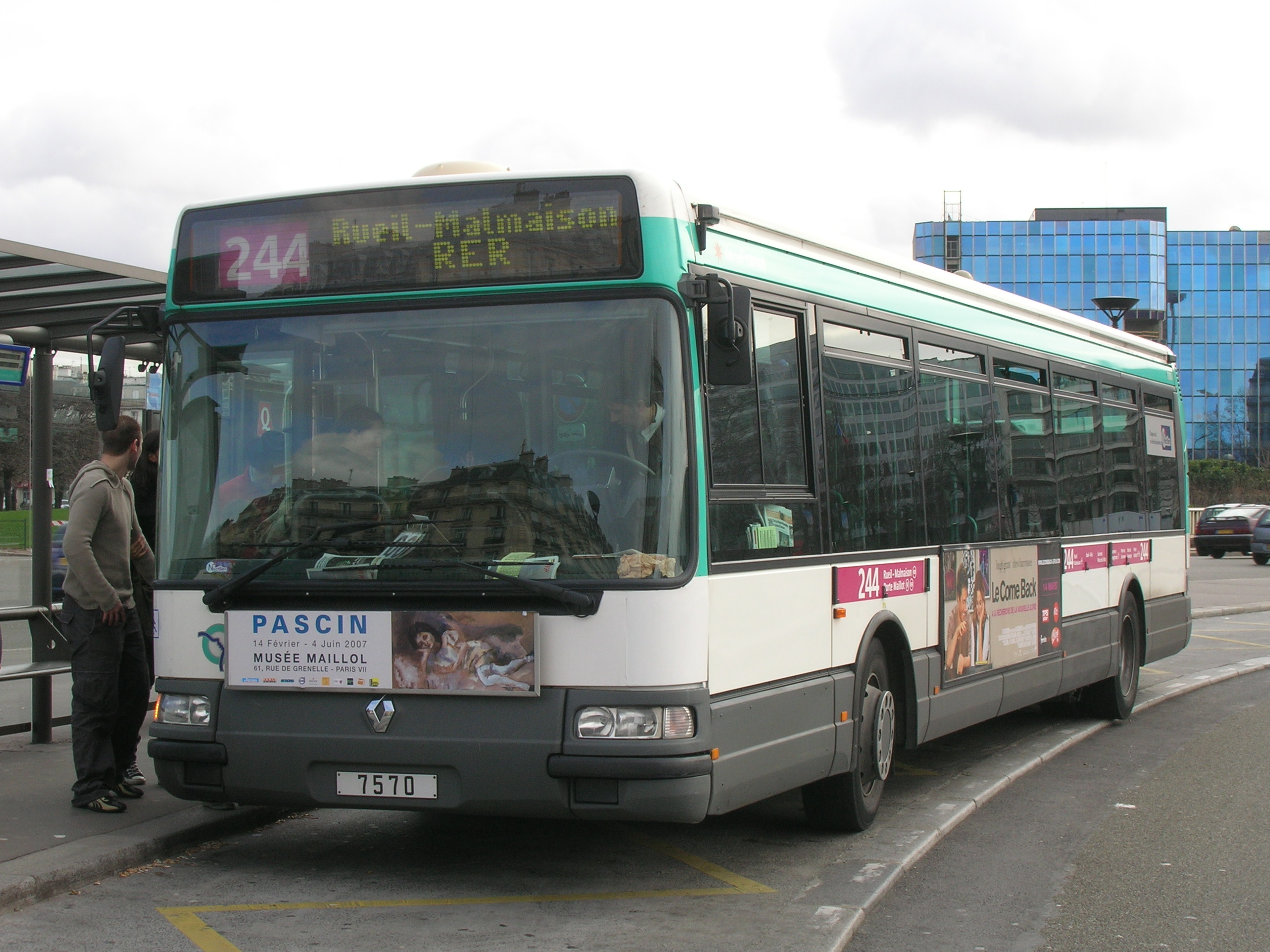 Bus Agora de la ligne RATP 244 au terminus de la Porte Maillot à Paris.